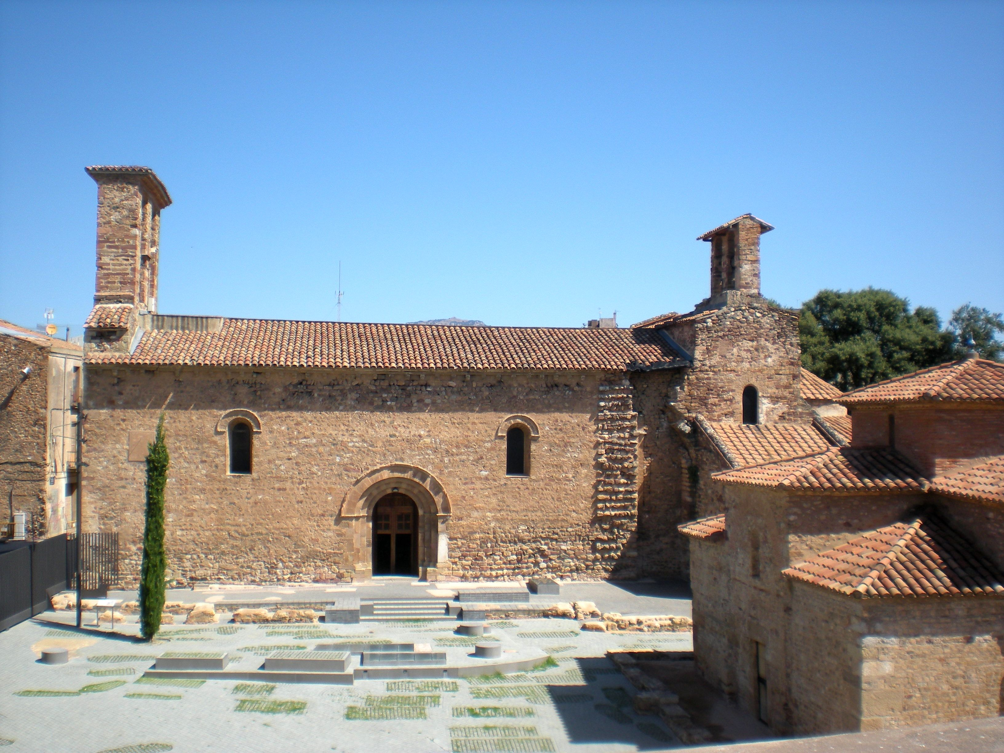 Las iglesias románicas de San Pedro, San Miguel y Santa María forman el conjunto artístico más importante de Tarrasa y constituyen una de las joyas del arte románico catalán.